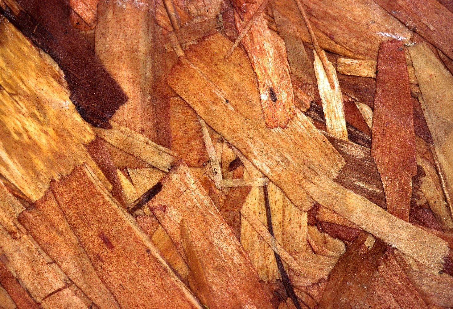 Makro Spanplatte